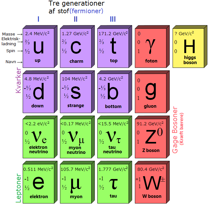 Standart modellen